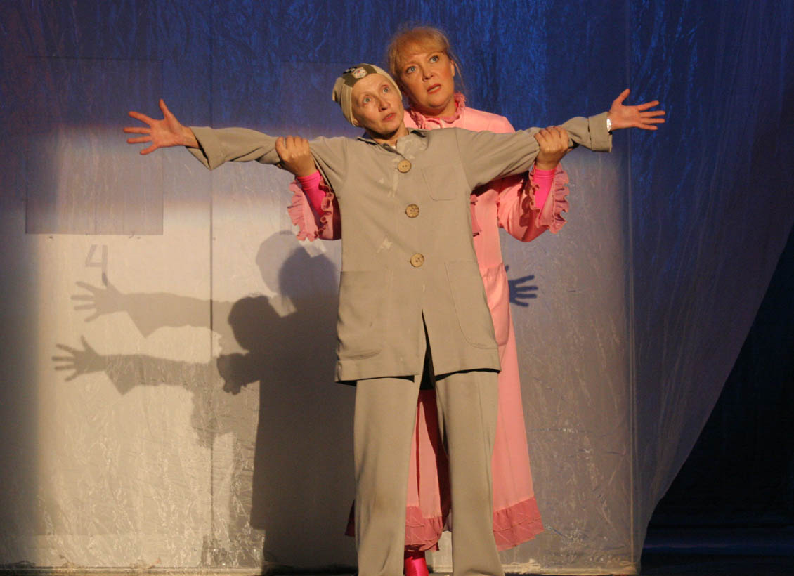 Сцена из спектакля «Оскар и розовая мама» Казанского государственного театра юного зрителя